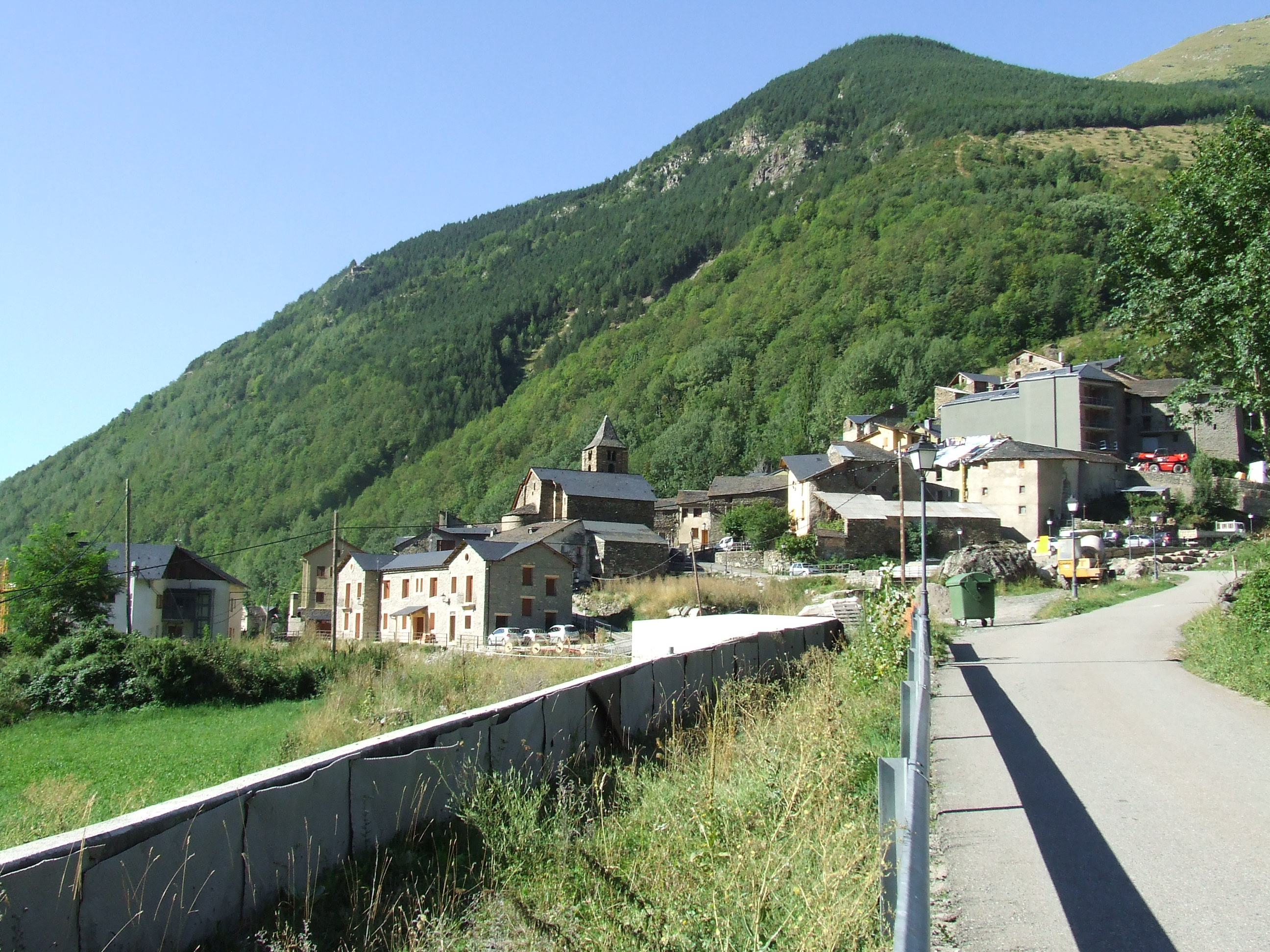 Espui (la Torre de Cabdella, Pallars Jussà)